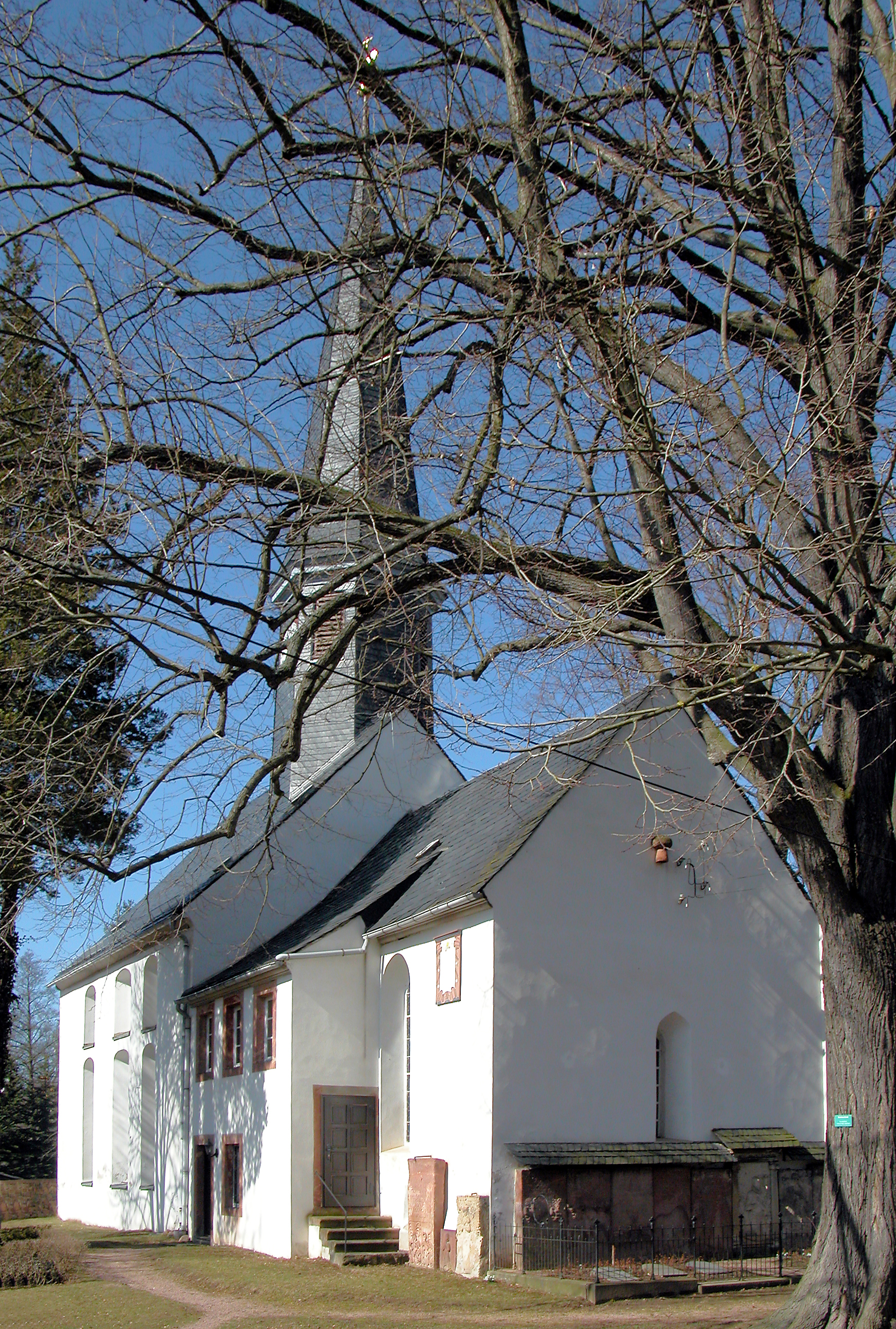 16.03.2012 09648 Ringethal (Mittweida), Hauptstraße (GMP: 51.005597,12.99918): In der Dorfkirche Ringethal befindet sich die wohl kleinste noch erhaltene Silbermann-Orgel mit 6 Registern und 379 Pfeifen. [DSCNn3214.TIF]20120316260DR.JPG(c)Blobelt